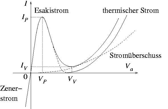 I-U-Charakteristik einer Tunnel-Diode